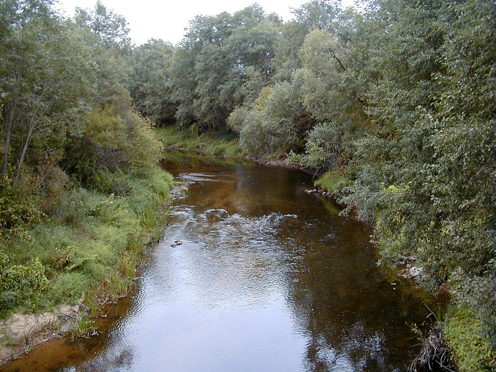 Gauja pie Lejasciema 1999-09-13